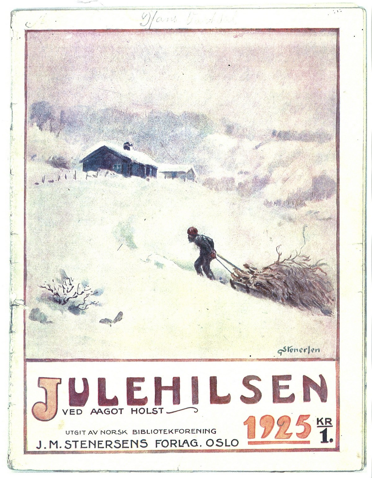 Framsida av Julehilsen 1925, skanna frå heftet